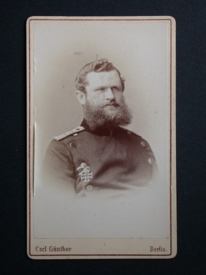 Friedrich Wilhelm Julius von Ising (* 31. Januar 1832 in Klein Wasserburg (Kreis Beeskow-Storkow); † 11. Juli 1898 in Berlin) war königlich preußischer Generalleutnant und zuletzt Kommandant des Berliner Zeughauses